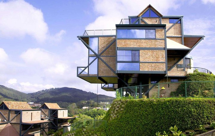 Casa construida en terreno irregular con el sistema modular de construcción Oraaflex registrada por Cesar Garía Urbano Taylor